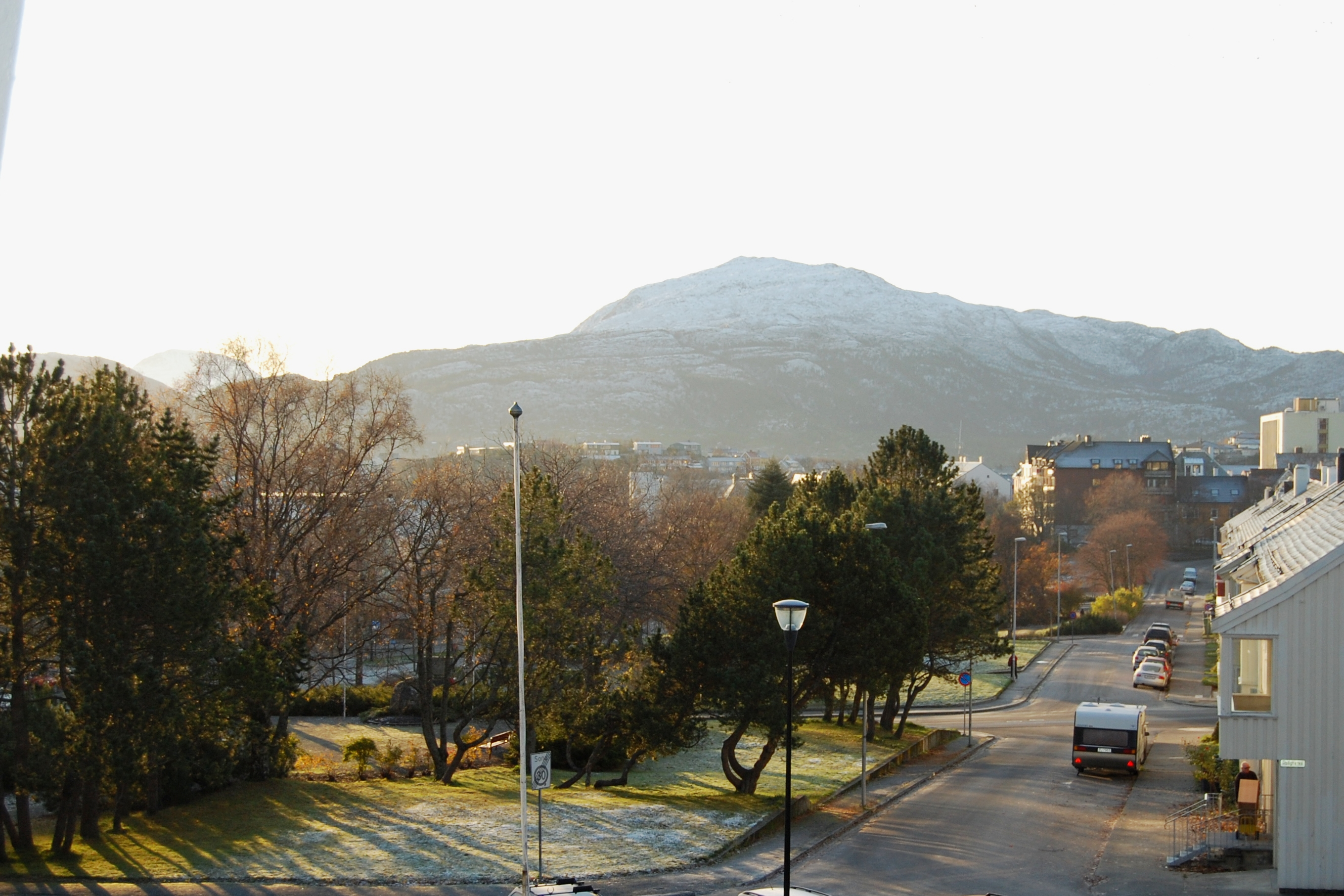 Øvreparken i Kristiansund, MR. Freikollen i bakgrunnen.